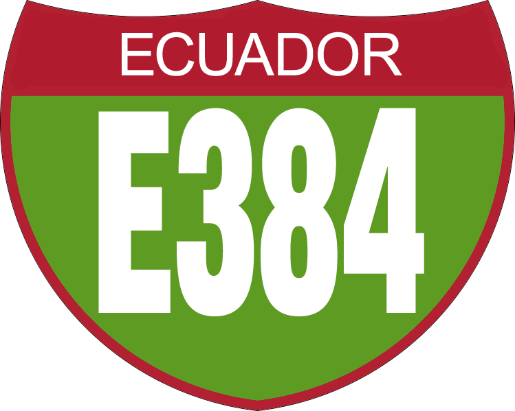 Disco de Identificación Vía Colectora E384